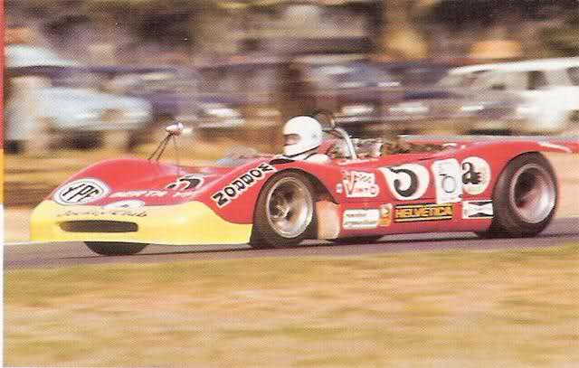 Luis Rubén Di Palma sobre un Berta-Tornado en Sport Prototipo Argentino, año 1972.